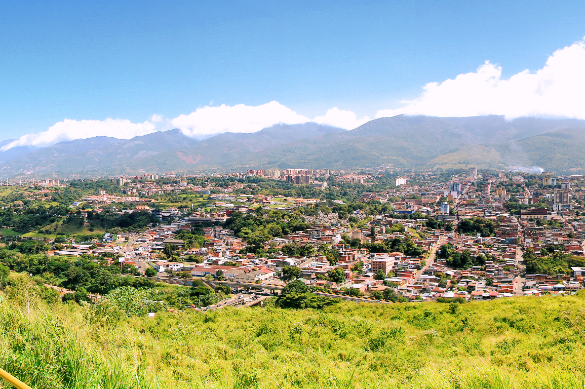 Imagen de la ciudad de San Cristóbal